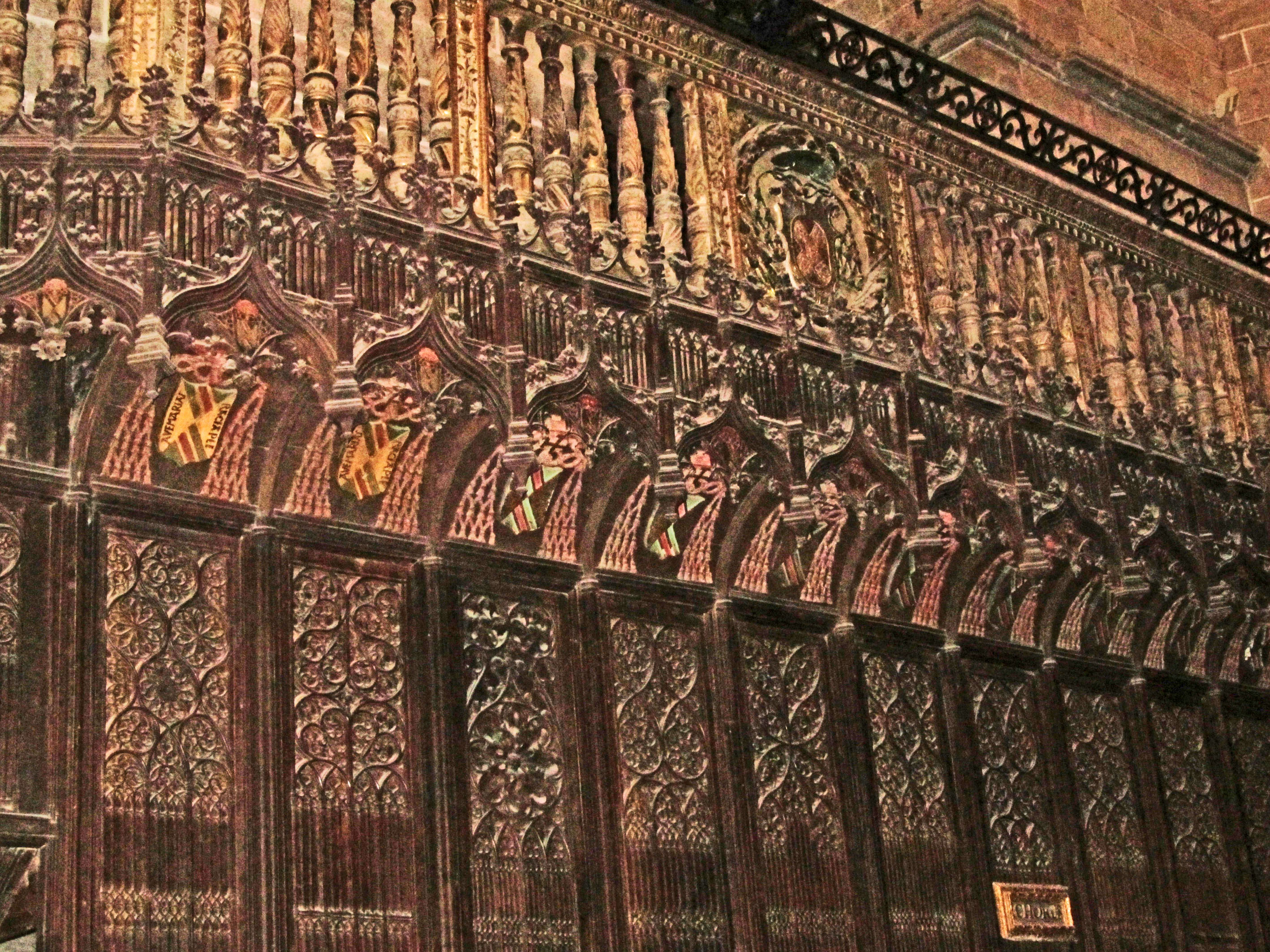 Detalle de la sillería del coro de la catedral de Sigüenza (Spain)